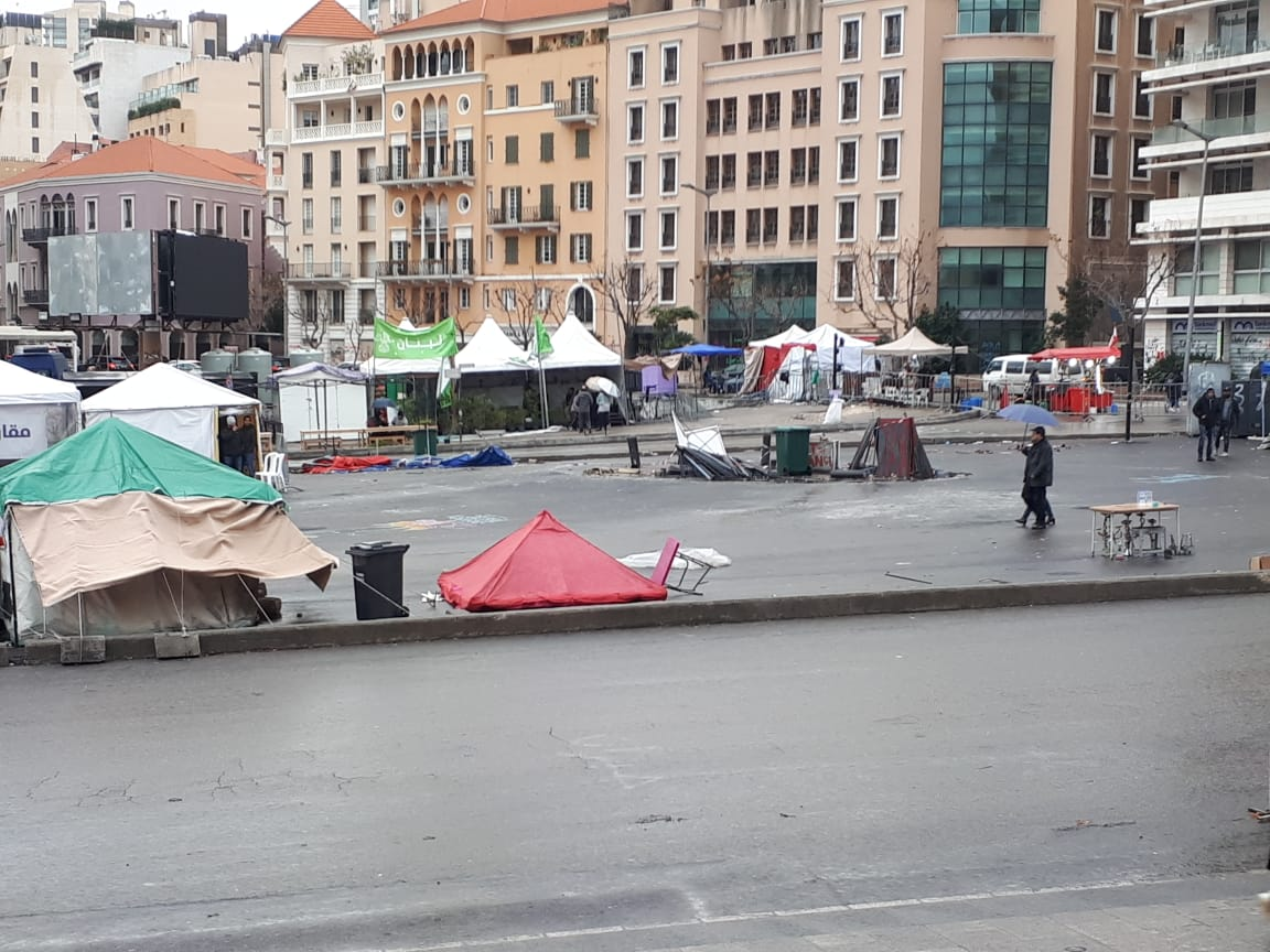 Verlassenes Lager der Demonstranten auf dem Beiruter Märtyrerplatz